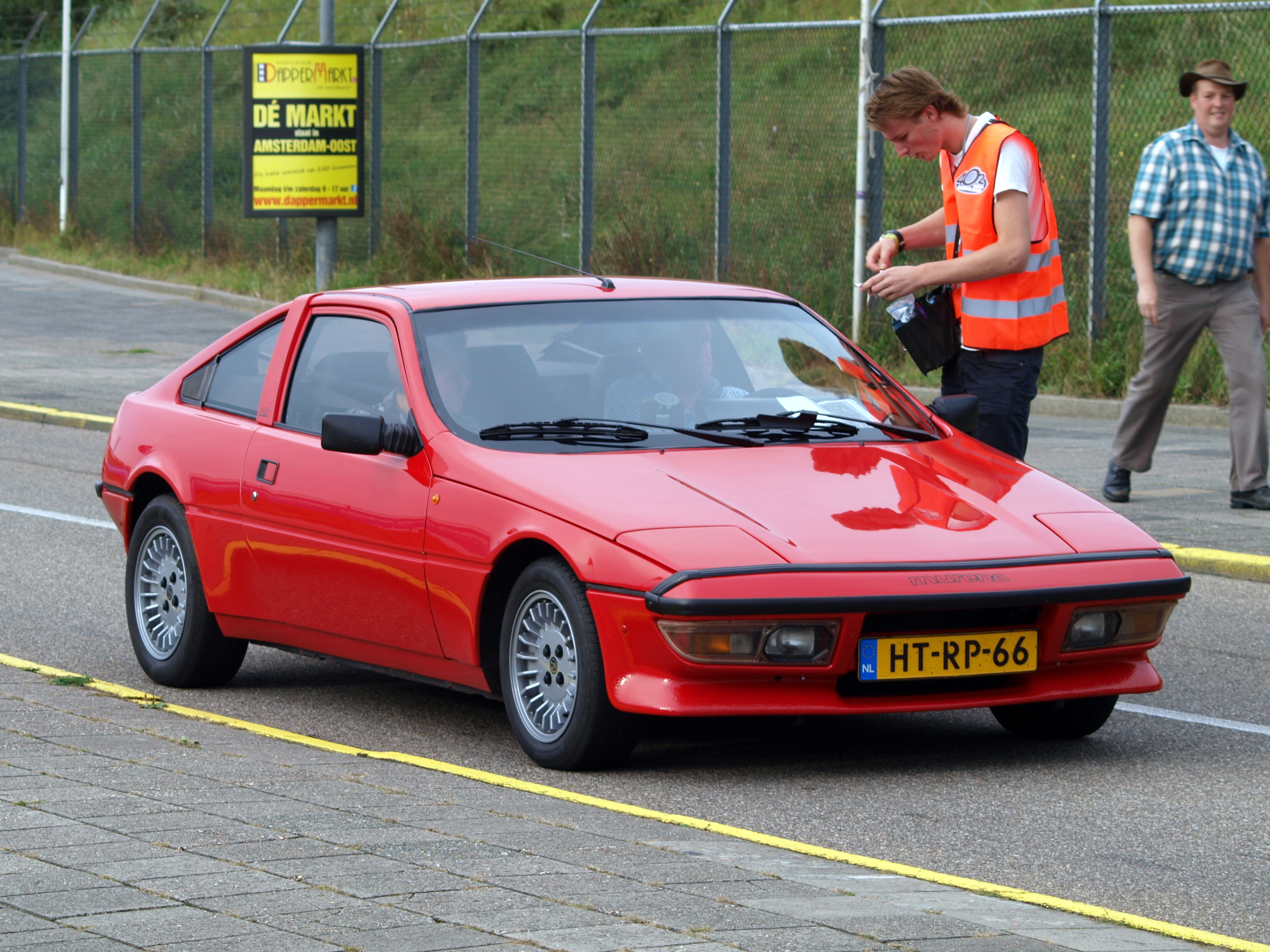 Nationaal Oldtimer Festival Zandvoort 2011.